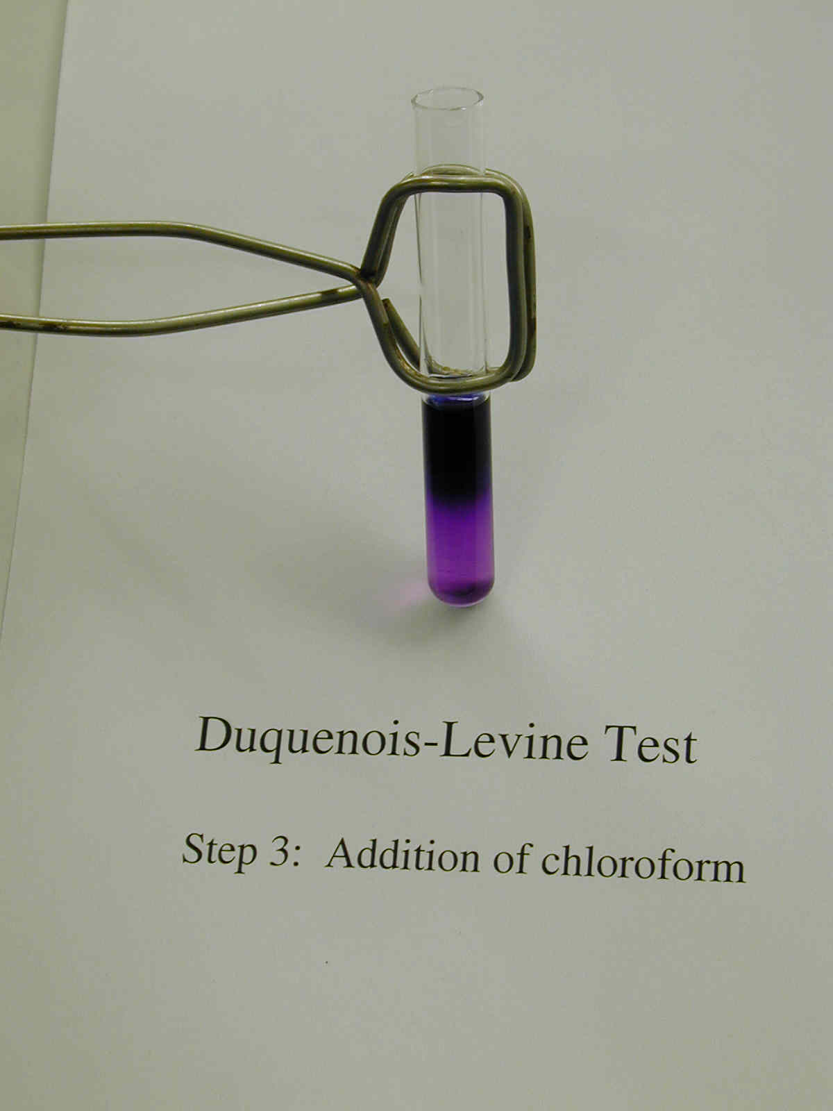 Duquenois-Levine test